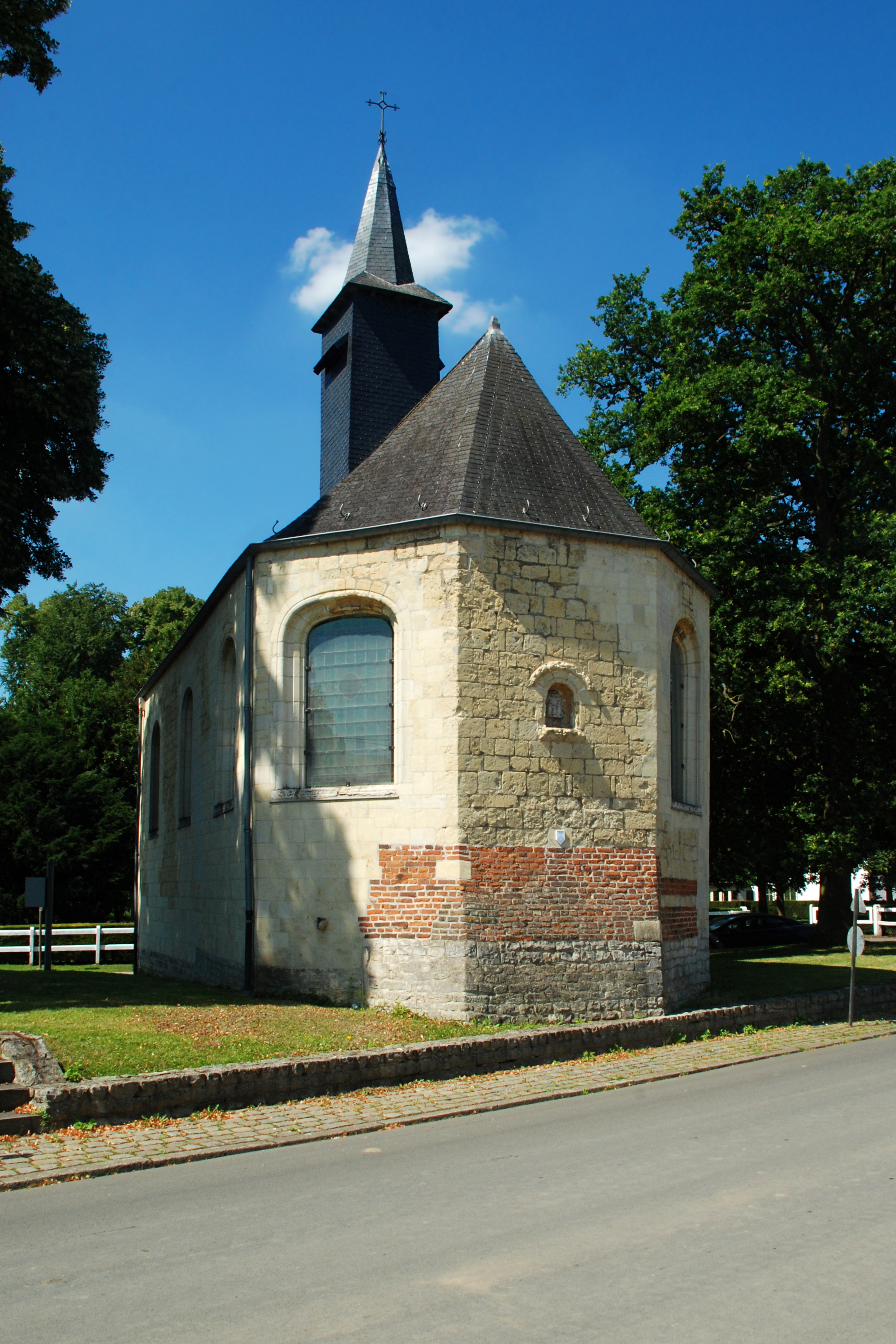 Belgique - Brabant wallon - Hélécine - Linsmeau - Chapelle Notre-Dame de la Colombe